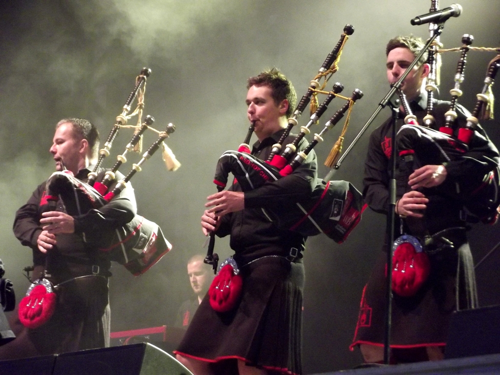 Zdjęcie zrobione podczas pierwszego dnia czwartej edycji Life Festival 2013 w Oświęcimiu.